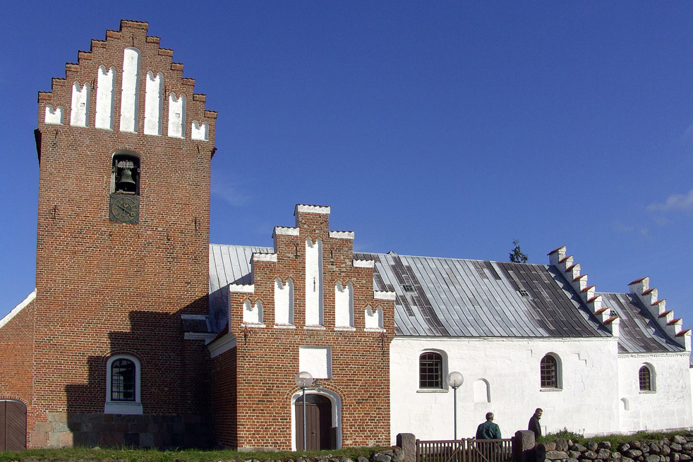 Auning kirke (Norddjurs)fra syd